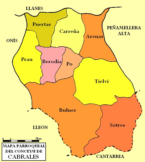 Mapa parroquial del conceyu de Cabrales, dixebráu en colores.